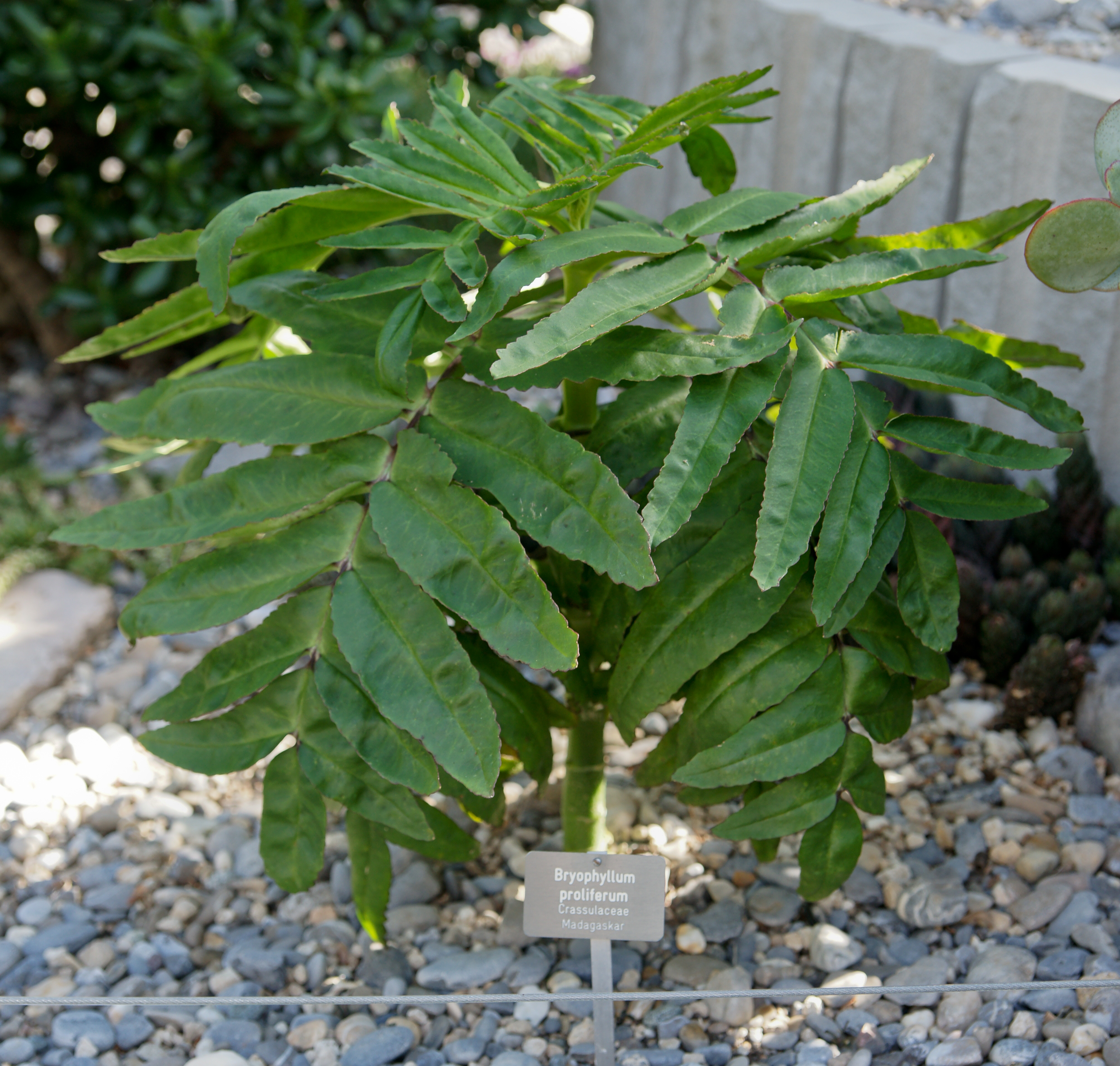 Kalanchoe prolifera (Syn. Bryophyllum proliferum). Schauhaus der Stadtgärtnerei Bern, Elfenau.